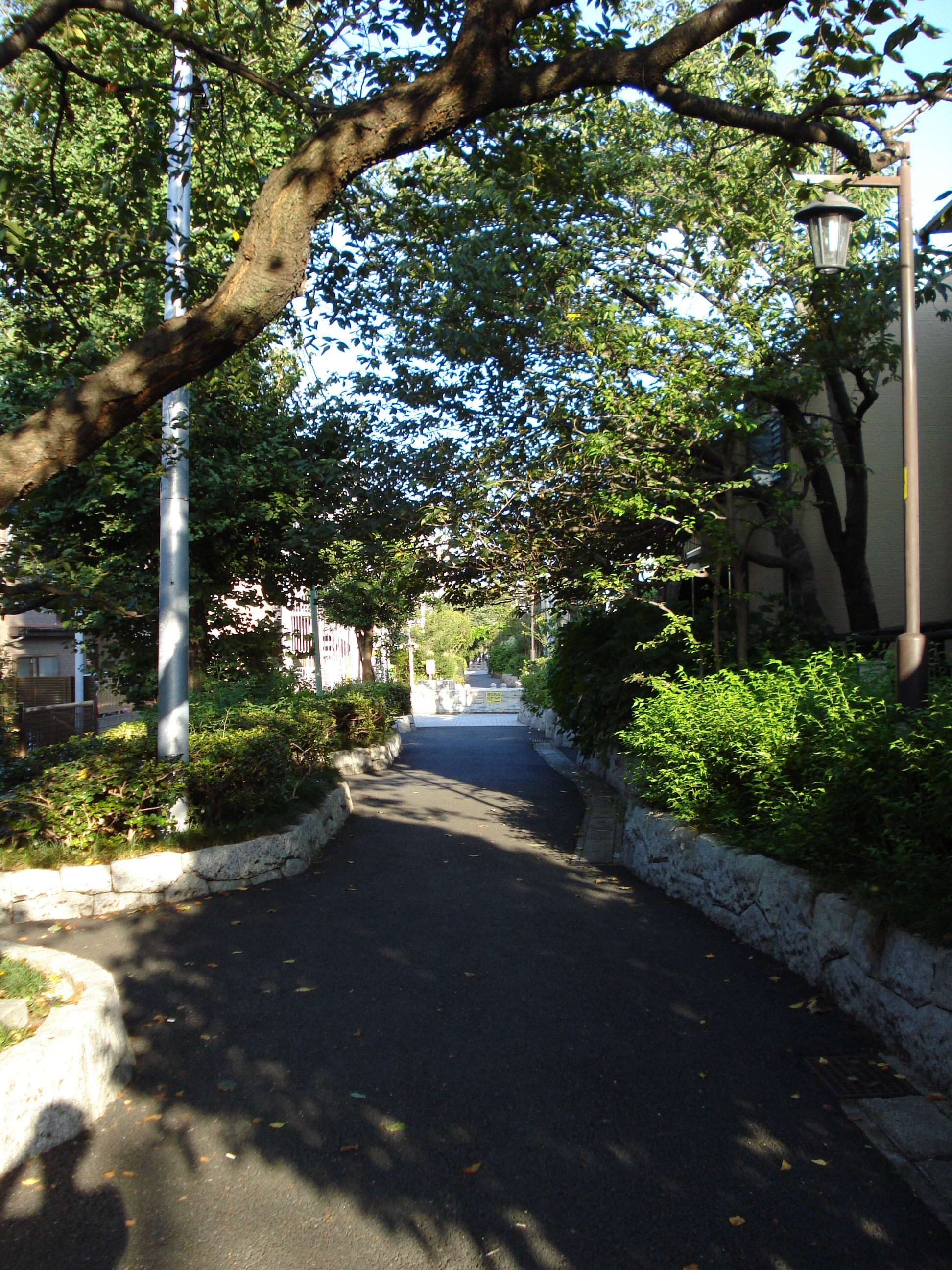 tokyo